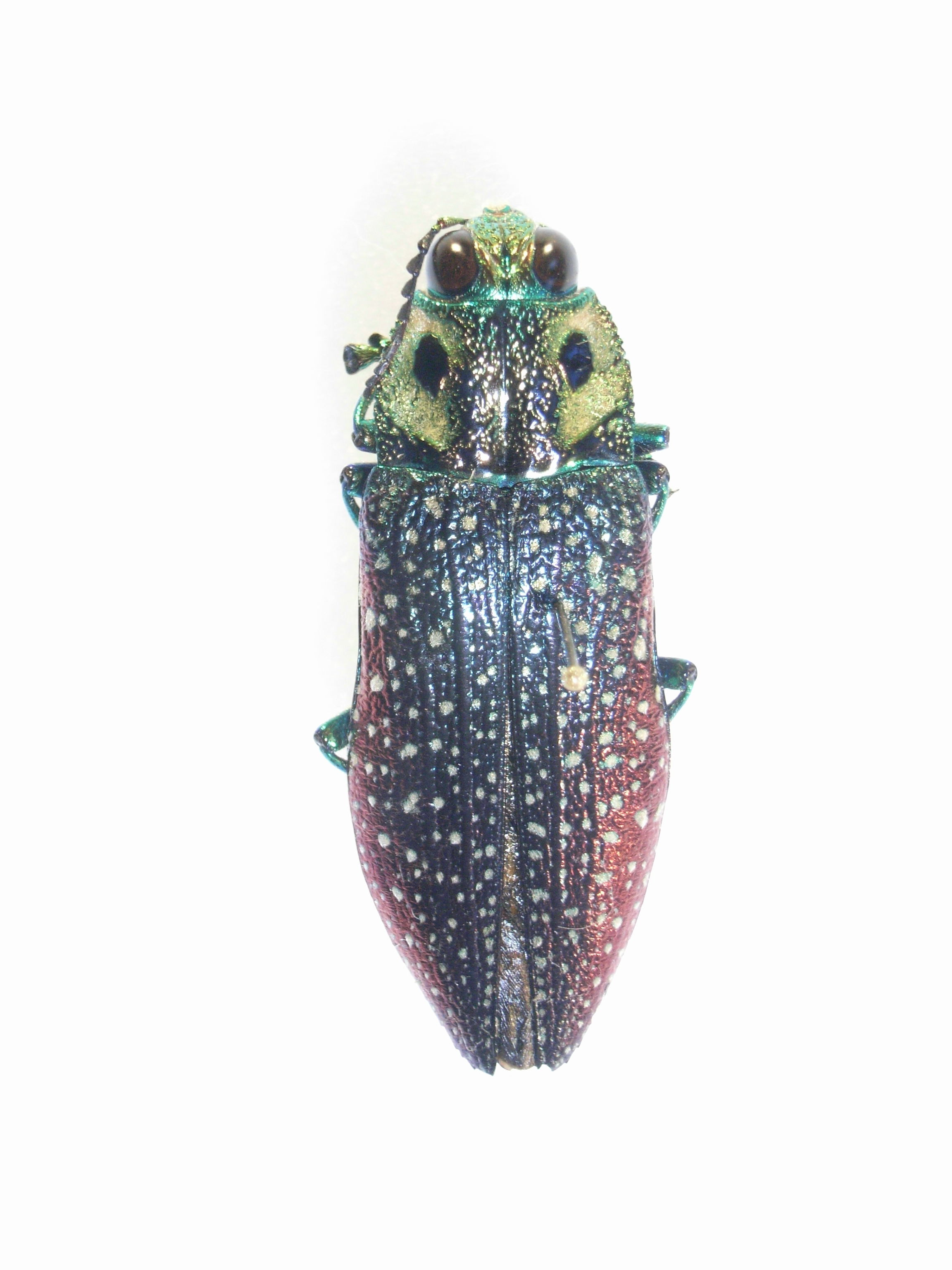 Madecassia rothschildi Gahan (= Lampropepla rothschildi) Ex coll. Felix Stumpe